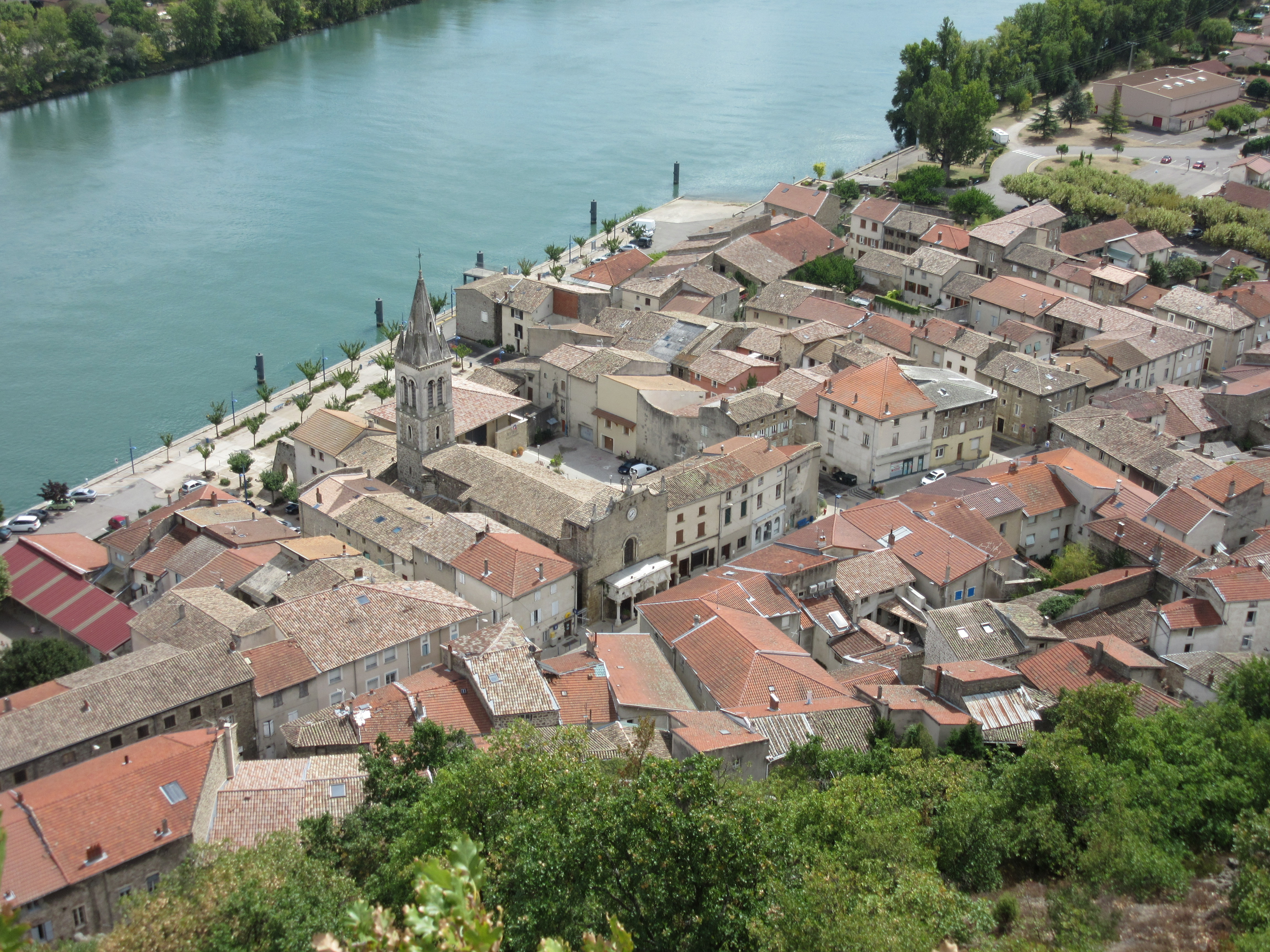 Vue du centre d'Andance depuis les Trois Croix